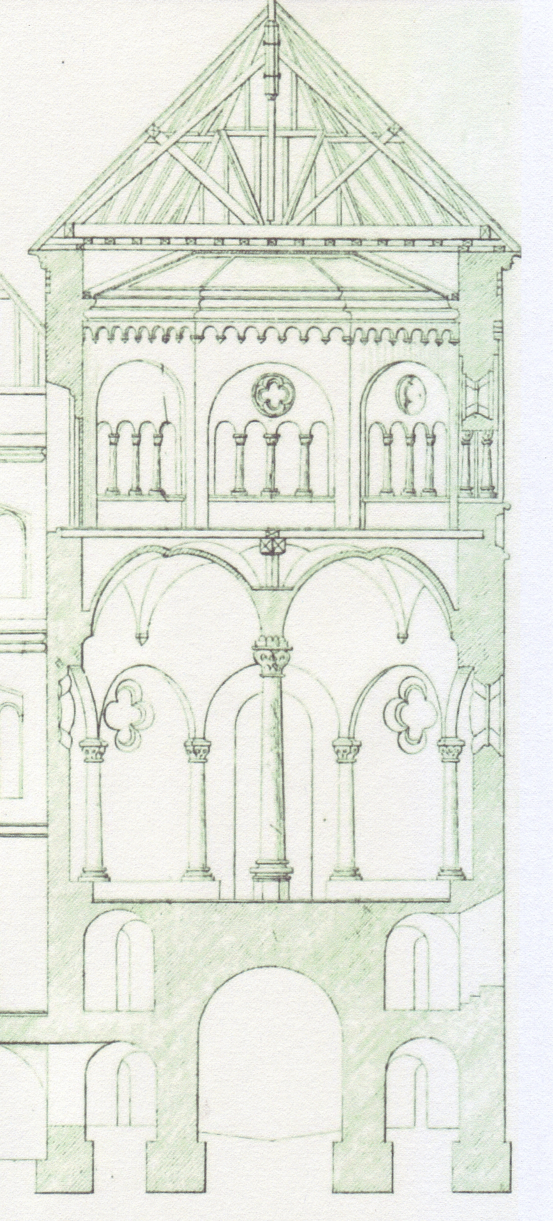 Burg Rheineck, Querschnitt durch die rekonstruierte romanische Doppelkapelle.